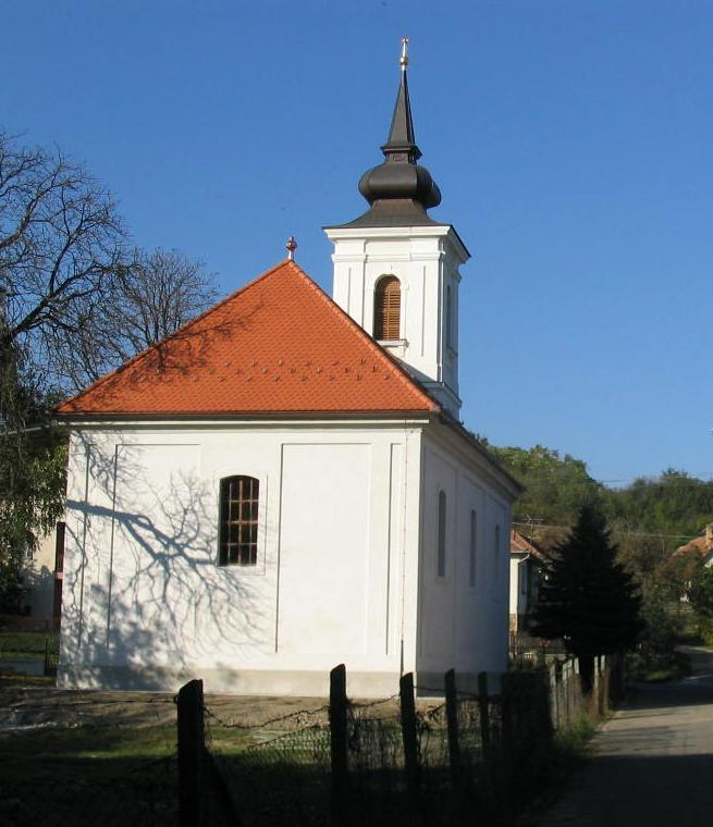 Bénye, evangélikus templom